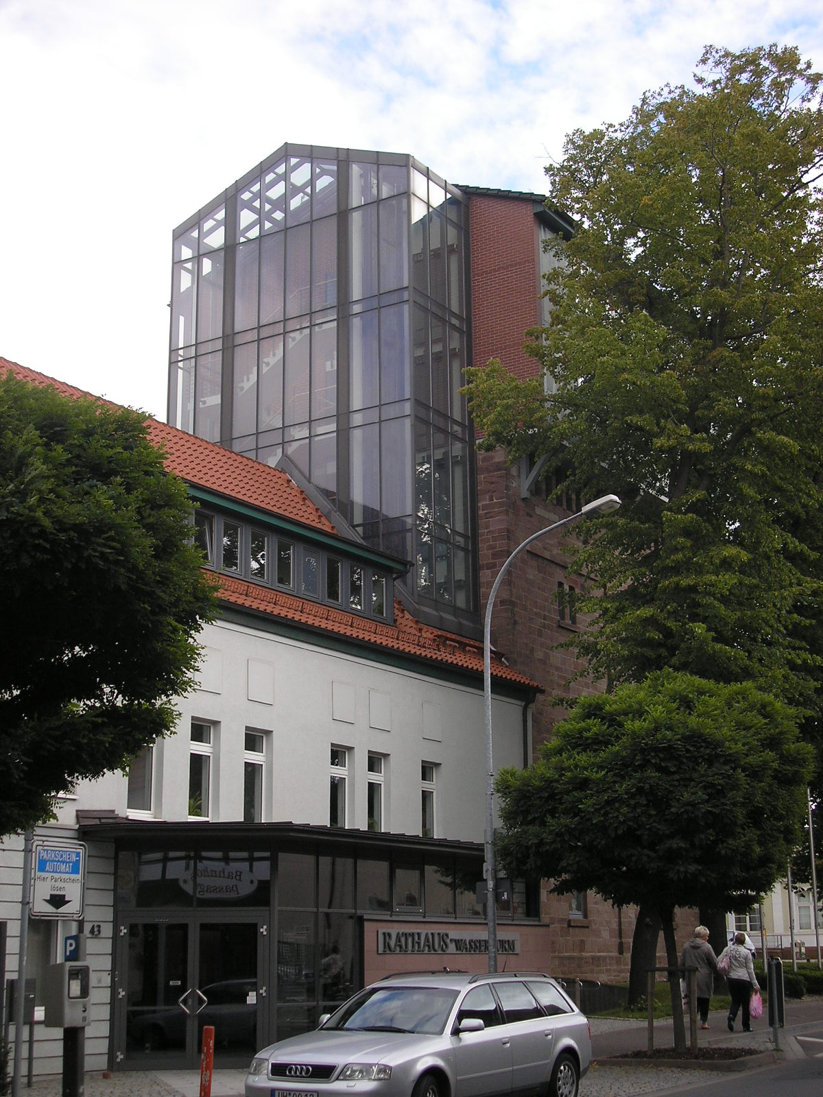 Das Rathaus von Leinefelde (Thüringen).